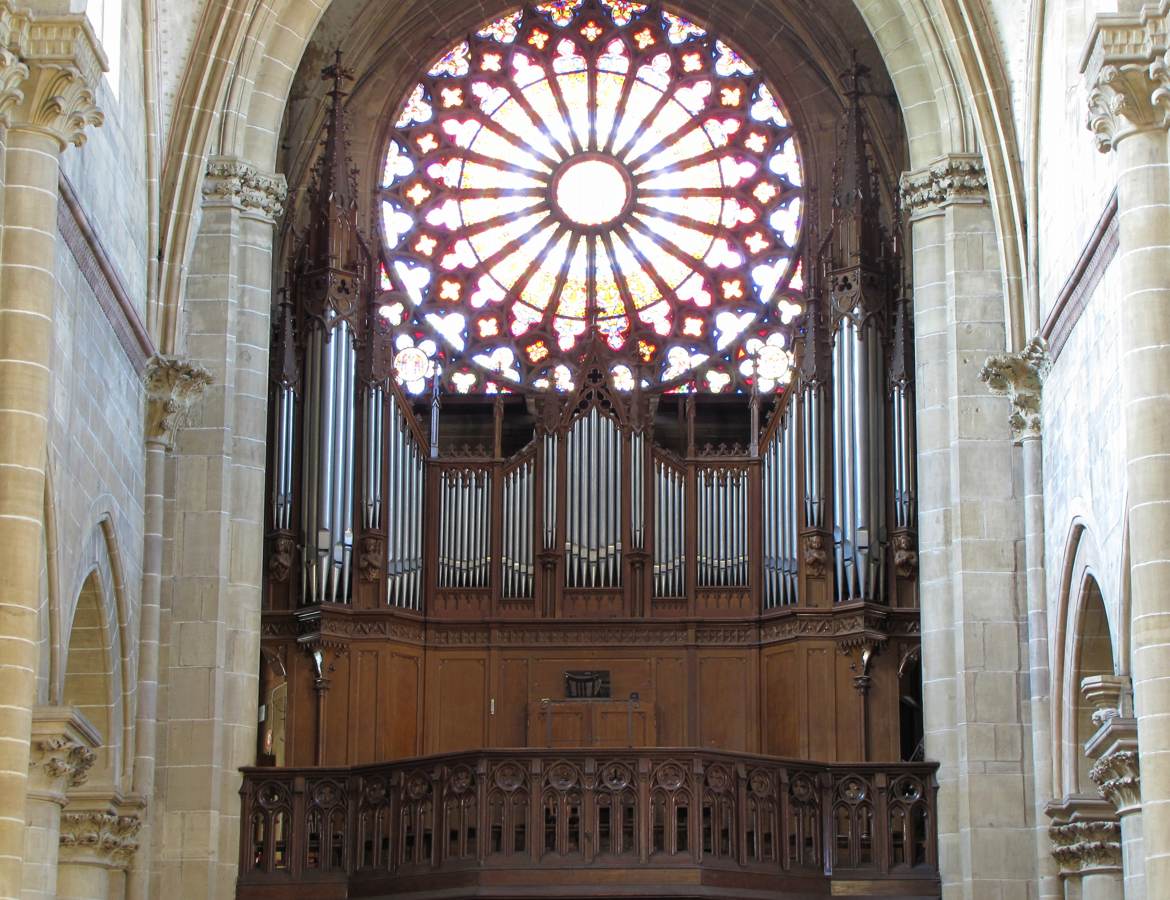 Alsace, Haut-Rhin, Église Notre-Dame de l'Assomption de Rouffach (PA00085638, IA68004432).Orgue Schott-Dubois-Callinet (1626-1855): This object is classé Monument Historique in the base Palissy, database of the French furniture patrimony of the French ministry of culture, under the references PM68000933, IM68007739 and instrument PM68000935 instrument.